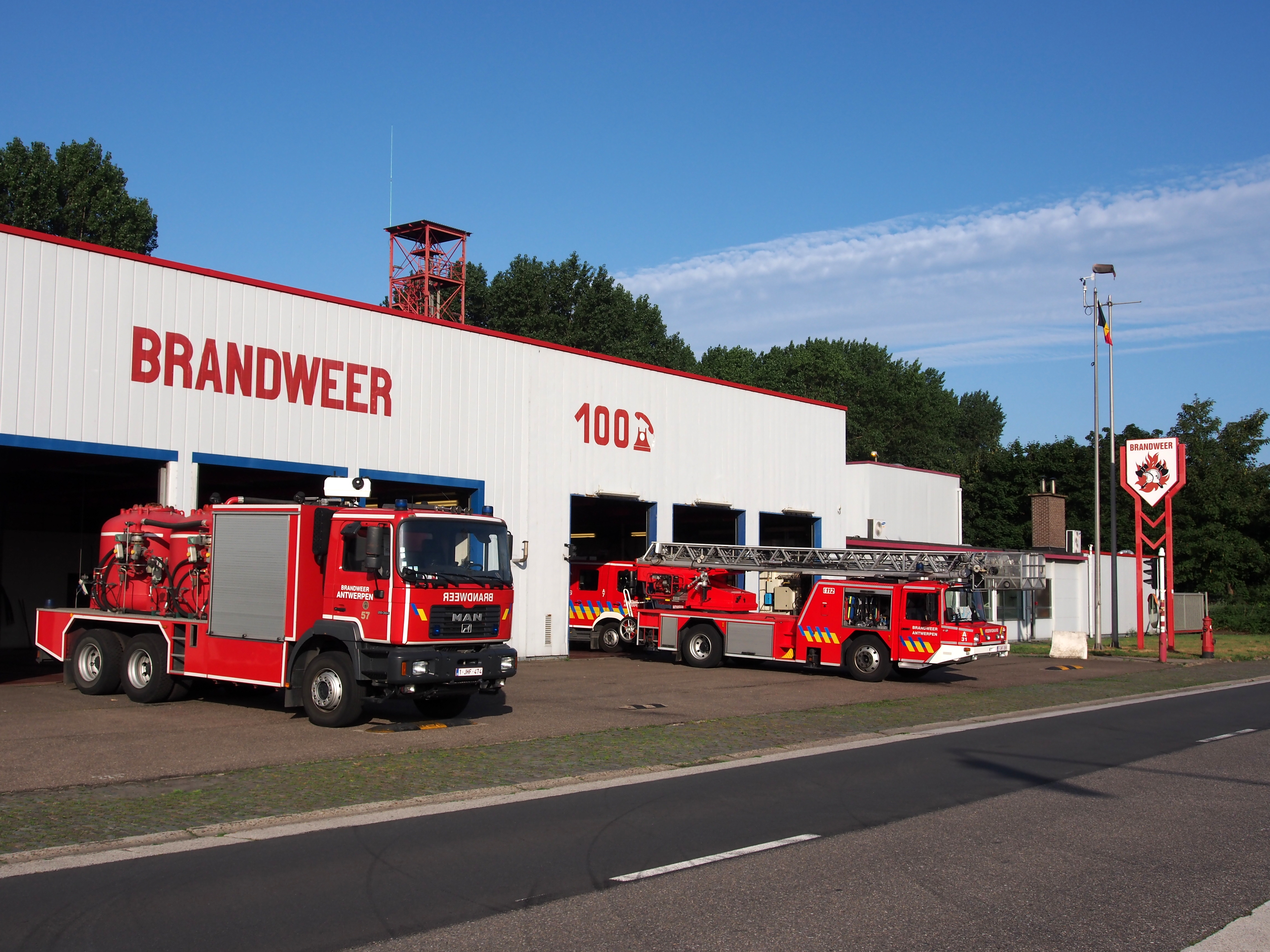 Brandweerwagens Brandweer Antwerpen voor de kazerne in de Antwerpse haven.